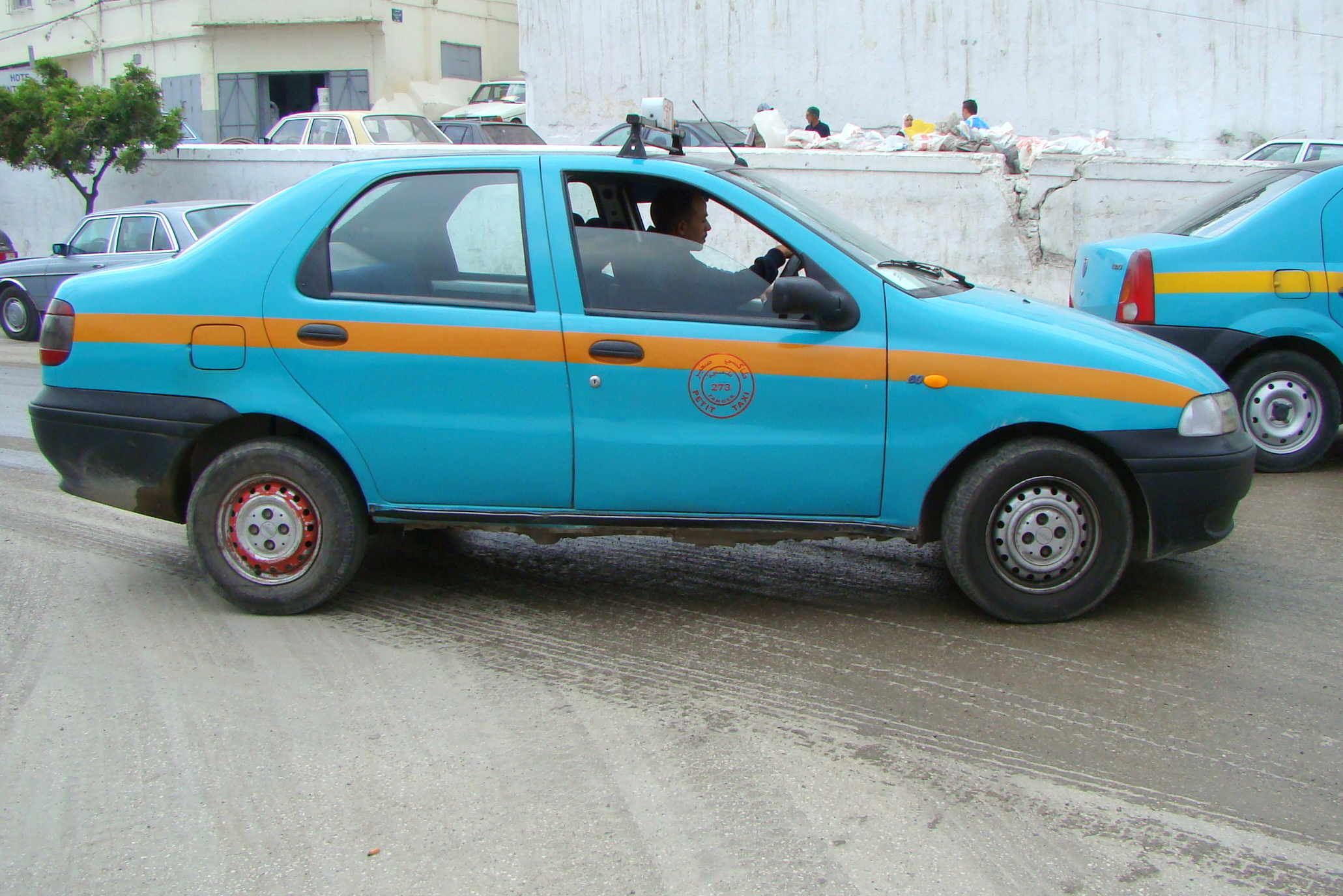 Maroko. Taksówka na ulicy Tangeru (Fiat Siena)